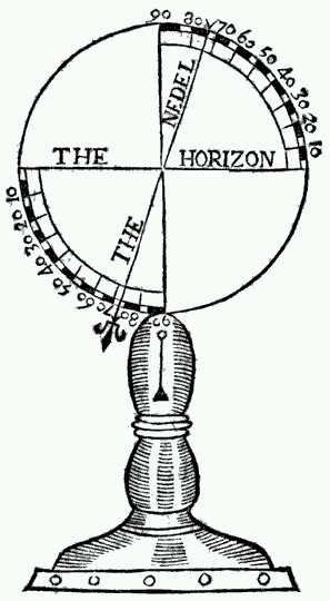 Figure of a dip circle, illustrating magnetic dip